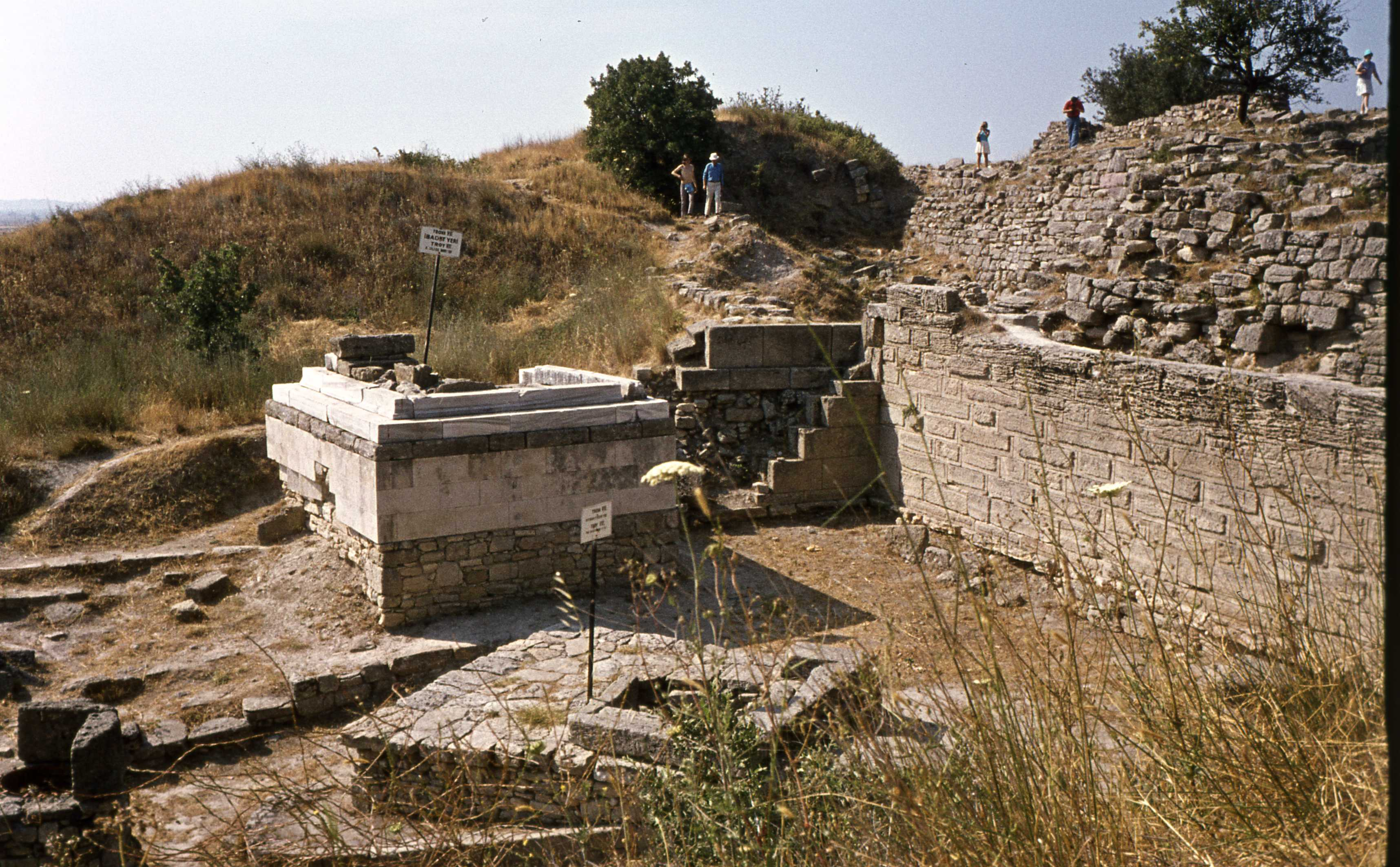 Troja Hissarlik Türkei Troy Hisarlik Turky